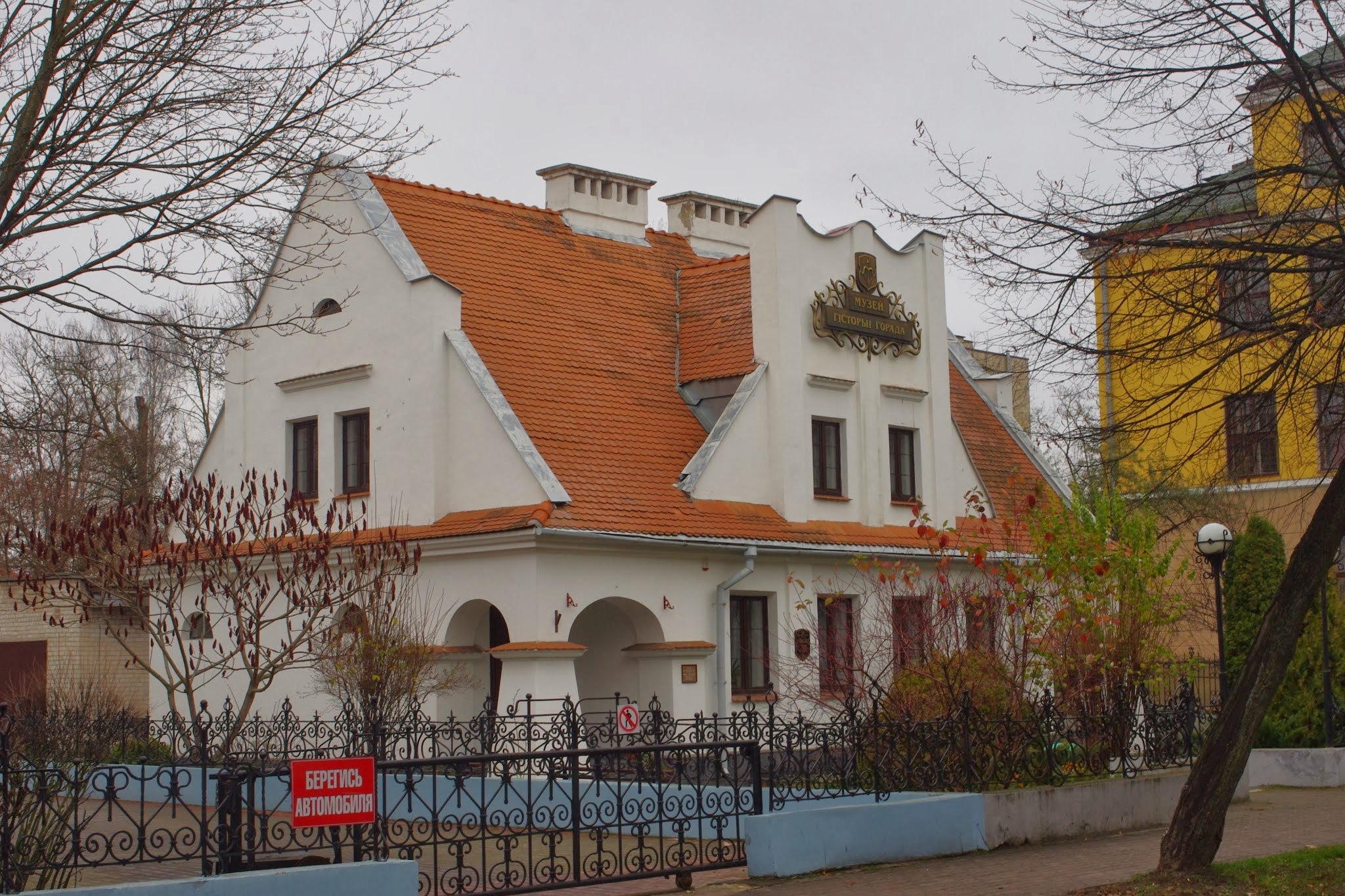 Lieninski rajon, Brest, Belarus